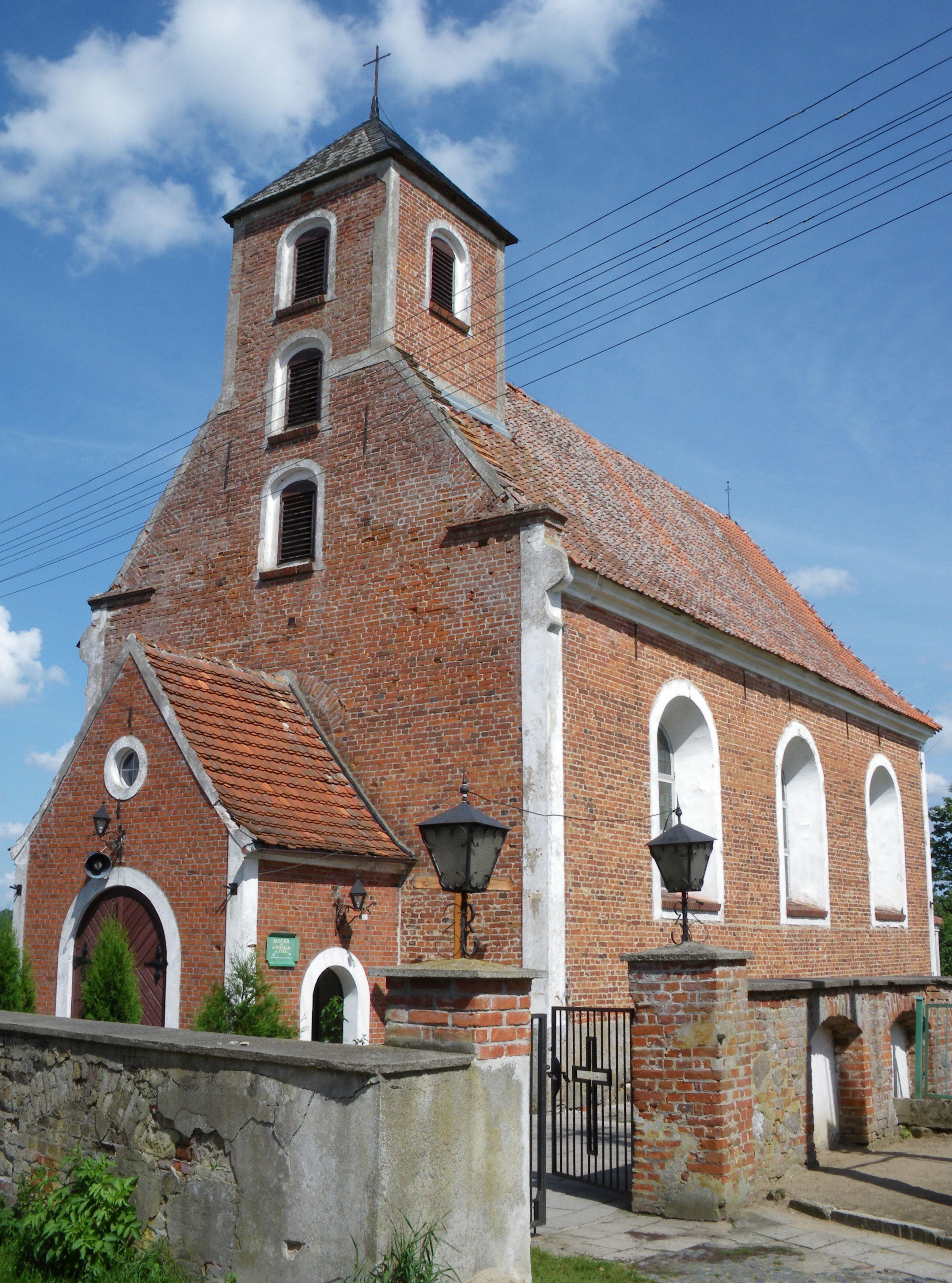 Stare Polaszki, kościół św. Mikołaja, południowo-zachodnia strona